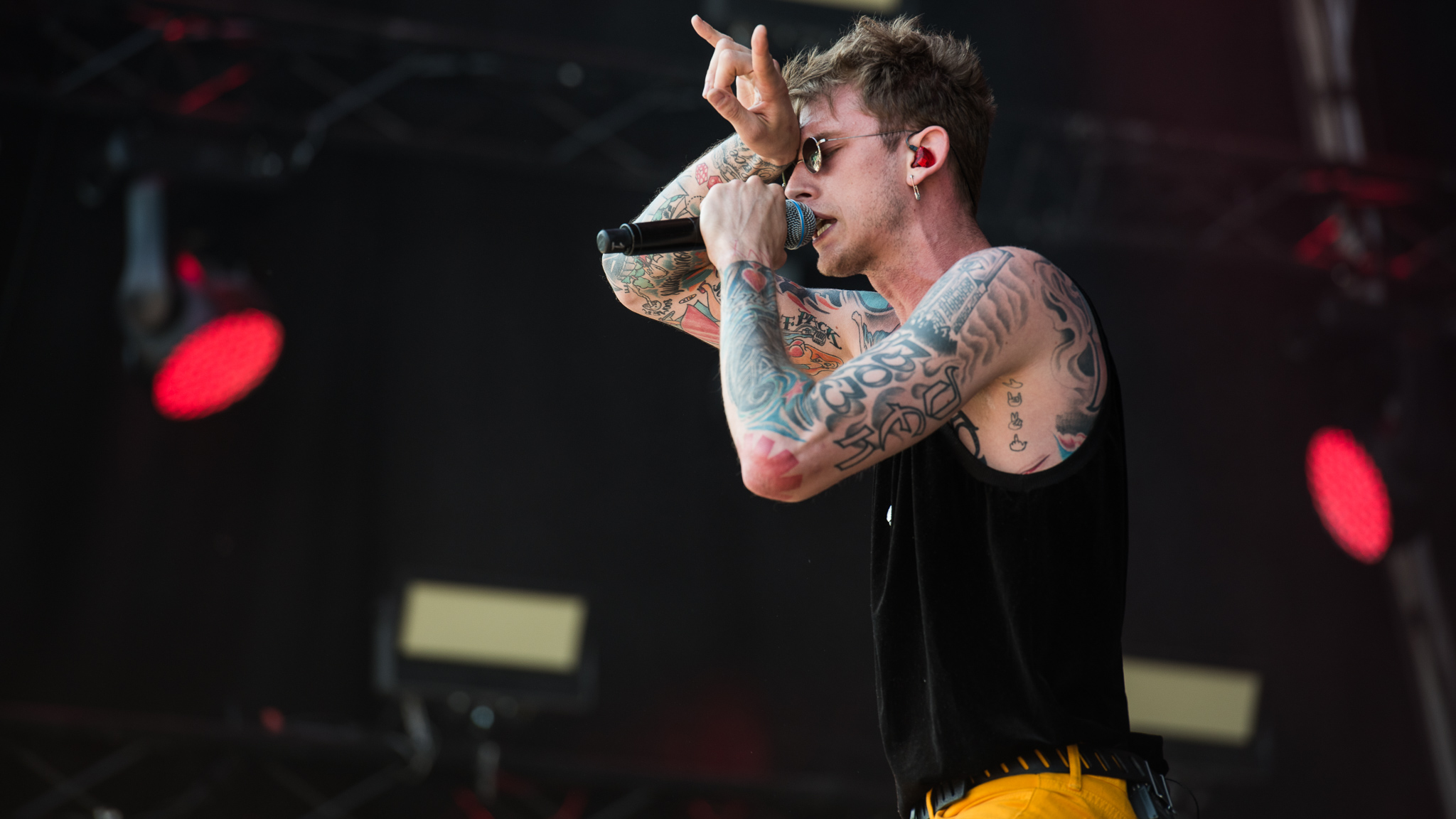 ARGO-Konzerte,Beck's Park Stage,Colson Baker,Konzert,Livekonzert,Livemusik,MGK,Machine Gun Kelly,Musik,RiP,Rock im Park 2017